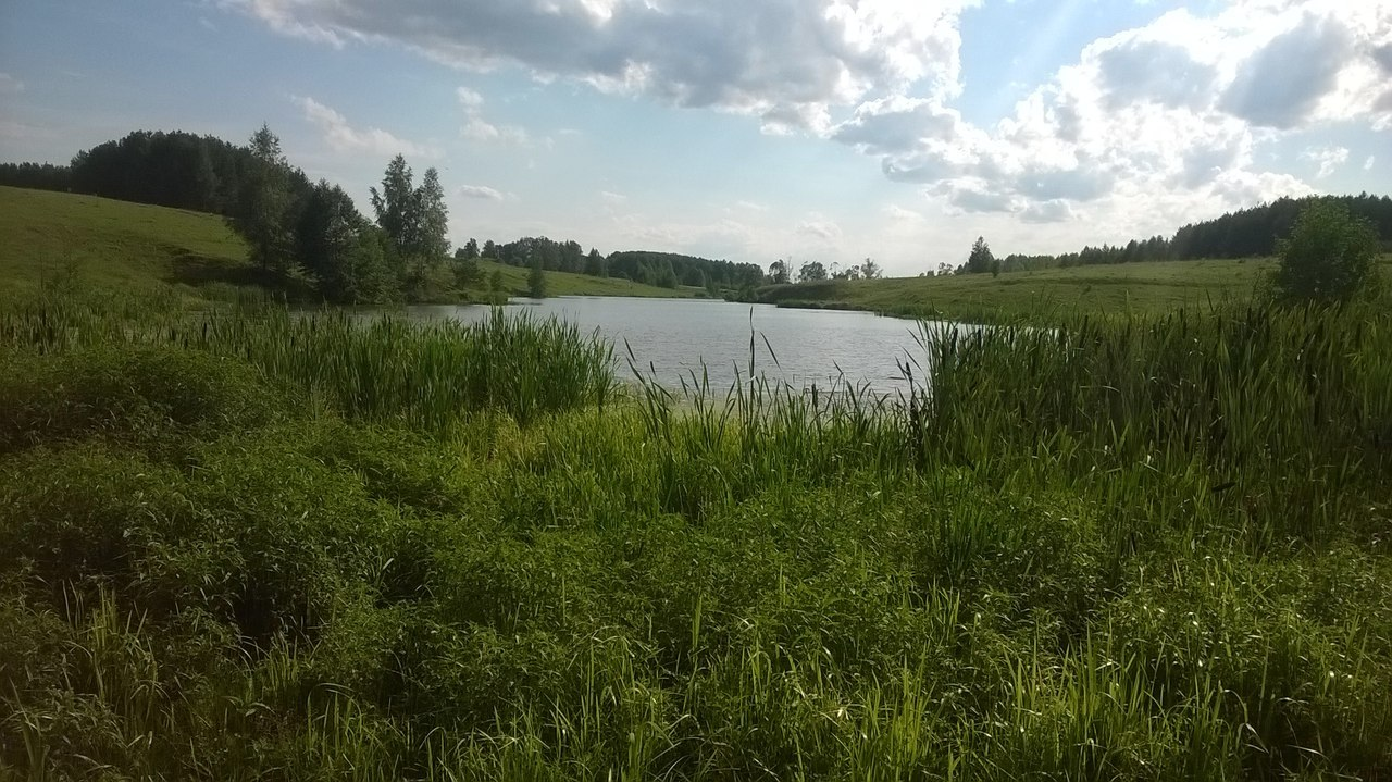 Пруд